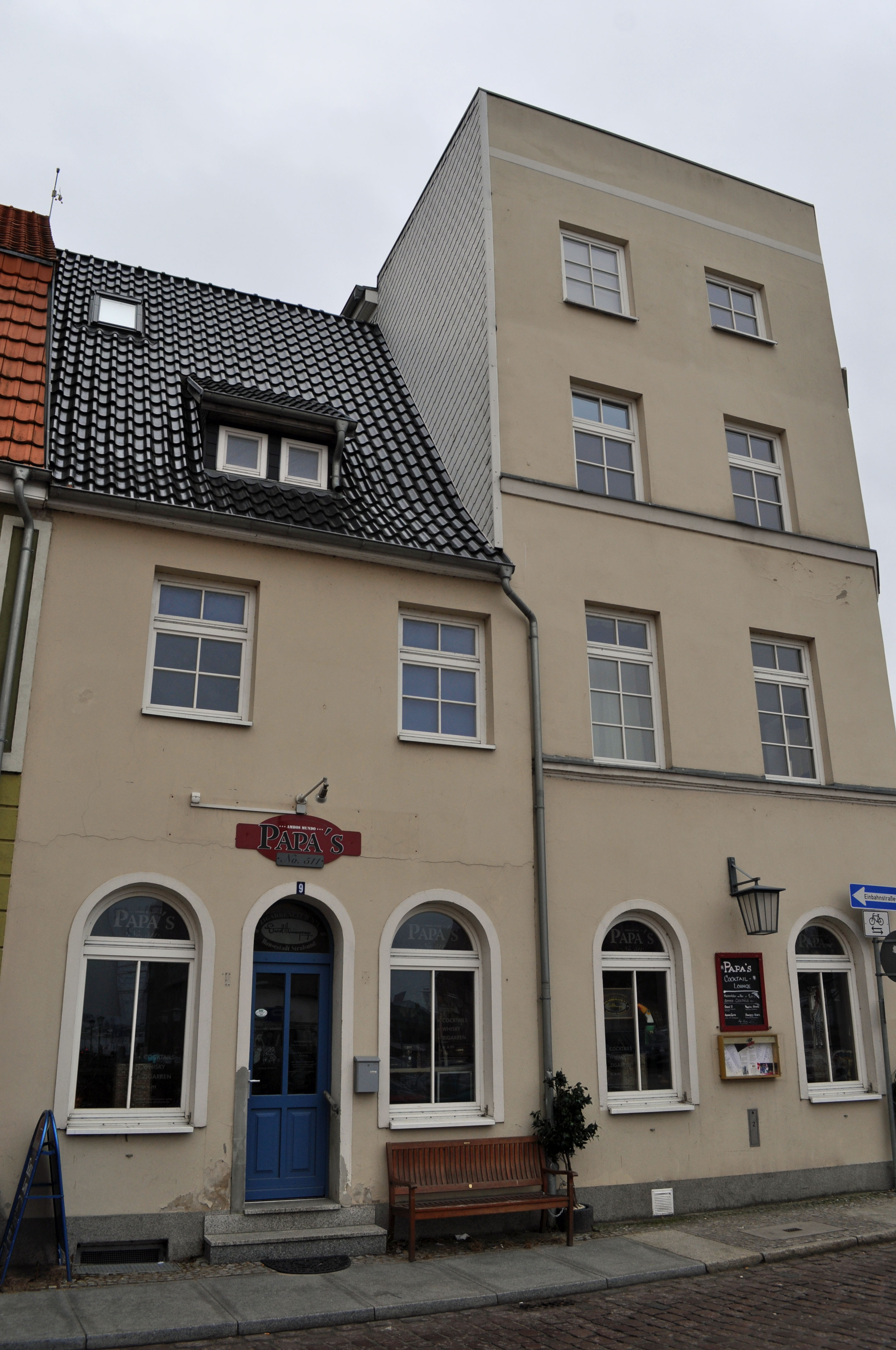 Gebäude bzw. Gebäudedetail in Stralsund. Straße und Hausnummer siehe Dateiname.